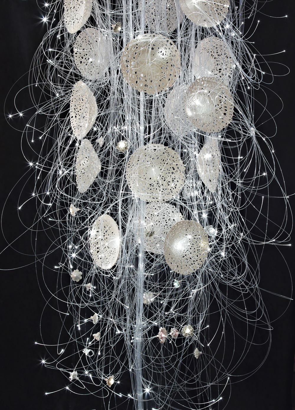 Caduta di fibre ottiche è un'opera in ceramica e fibre ottiche dell'artista italiana Antonella Cimatti (2011).